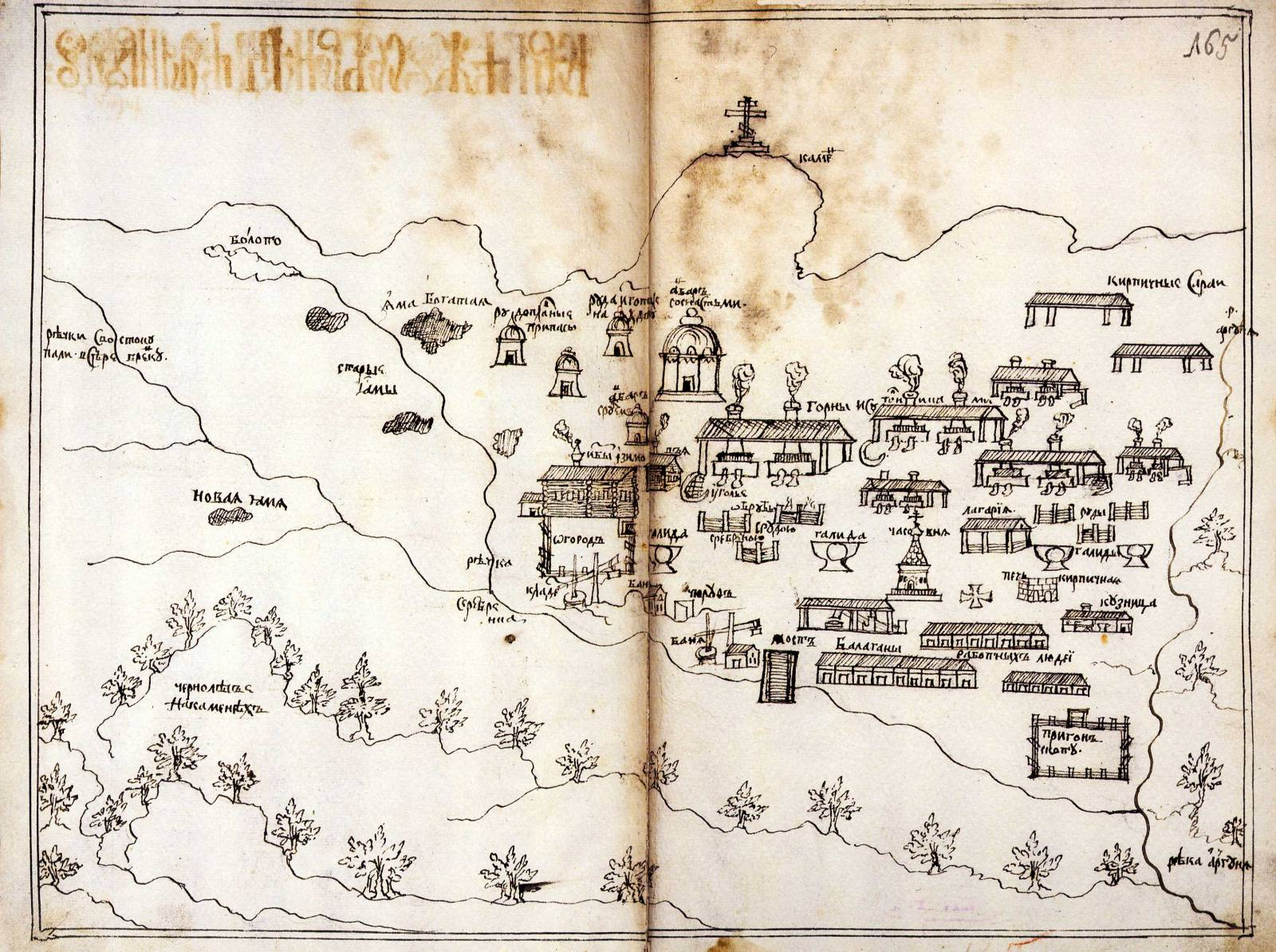 «Чертёж серебряного дела и руд». Нерчинский сереброплавильный завод. По «Служебной Чертежной книге Сибири» Семена Ремезова. 1701 год